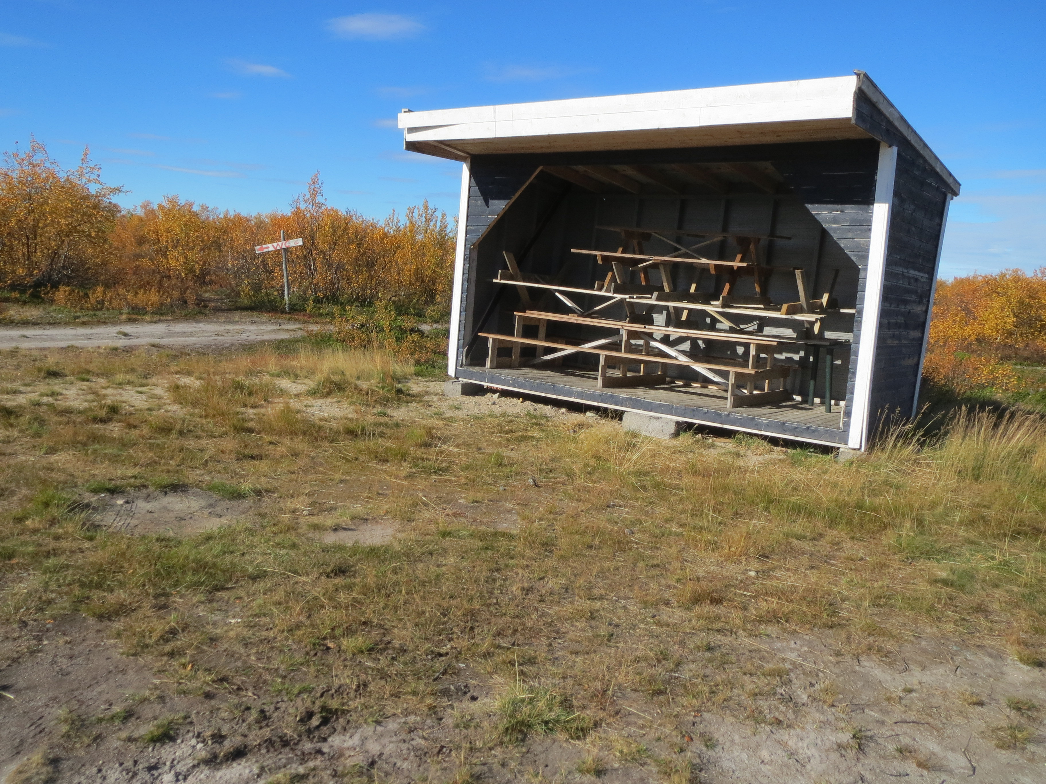 Cunovuohppi Sami Village, Kautokeino, Norway